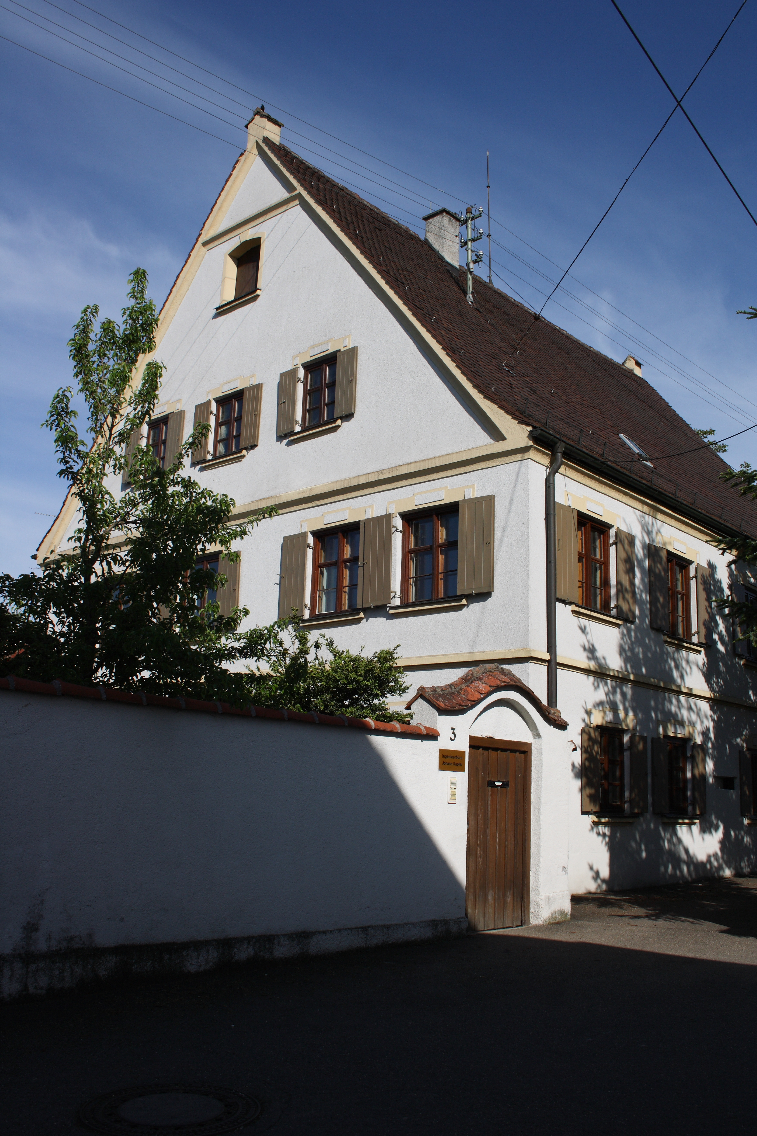 Pfarrhaus in Hausen bei Dillingen an der Donau (Bayern)